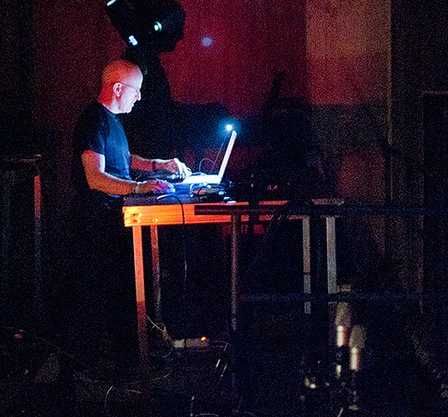 Lustmord